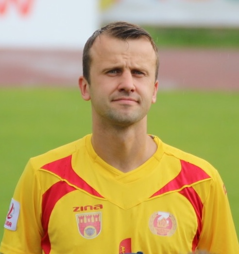 Maciej Mysiak przed meczem Znicz Pruszków - Nadwiślan Góra